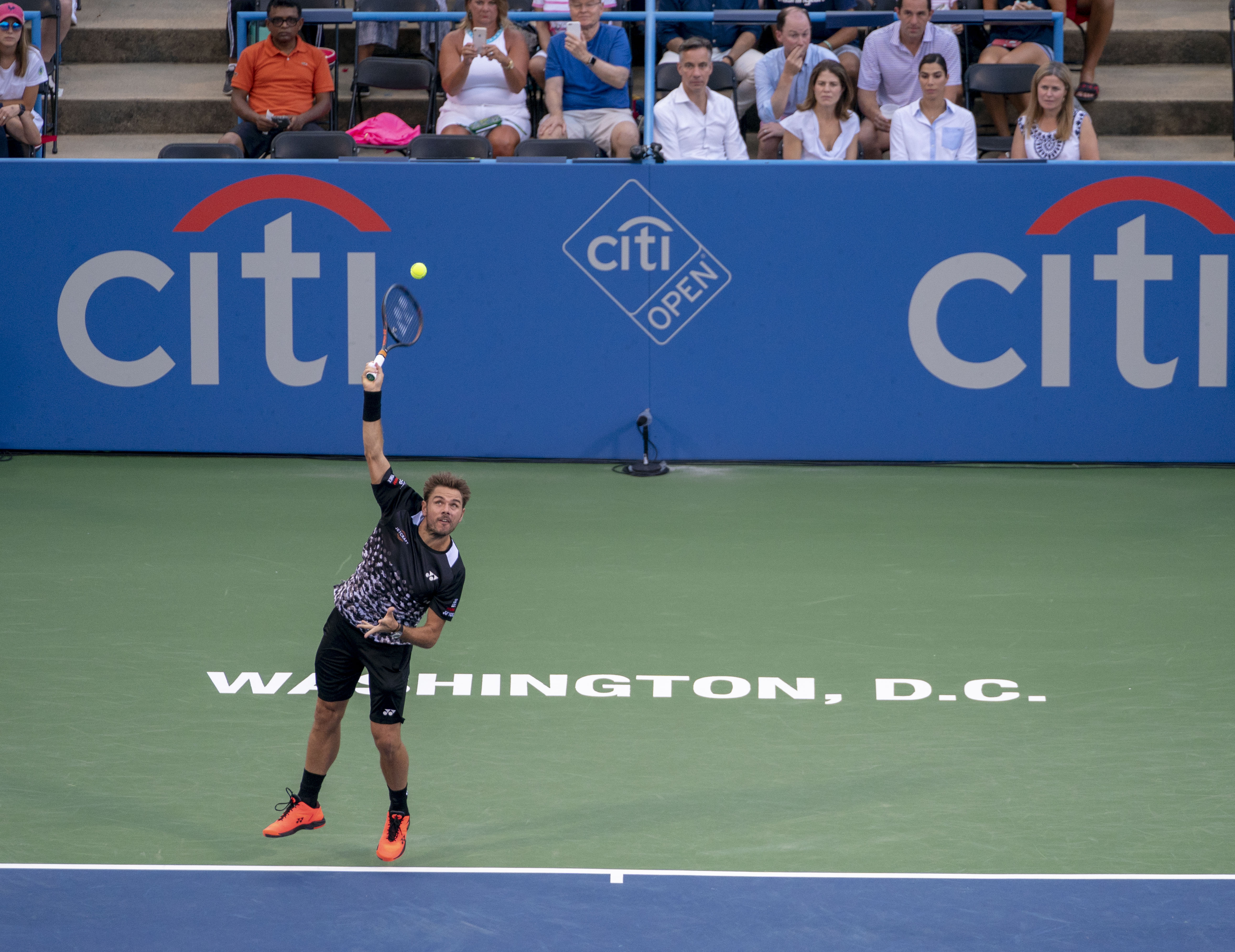 2018 Citi Open Tennis